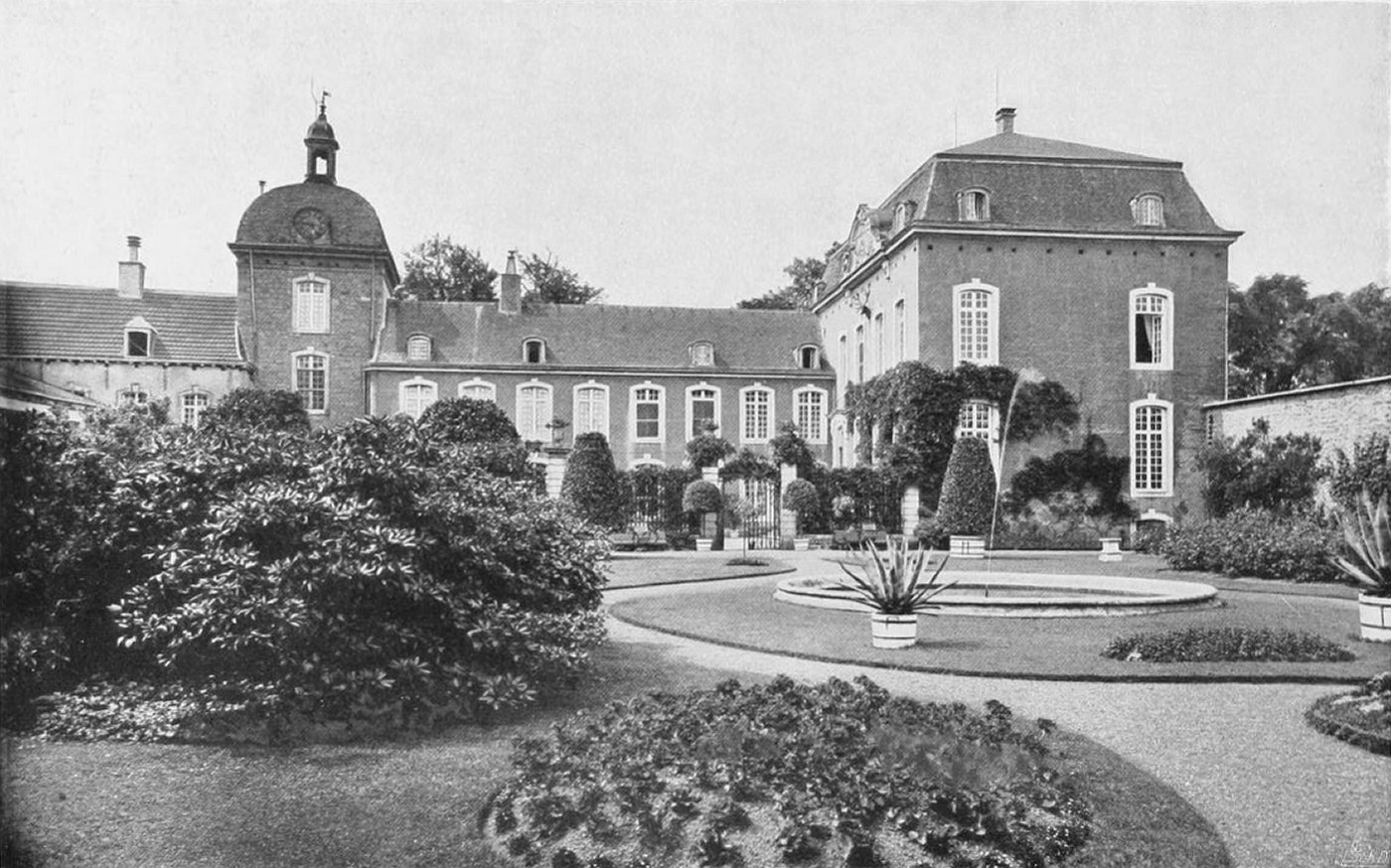 Garten und Herrenhaus von Gut Kalkofen in Aachen, Anfang des 20. Jahrhunderts